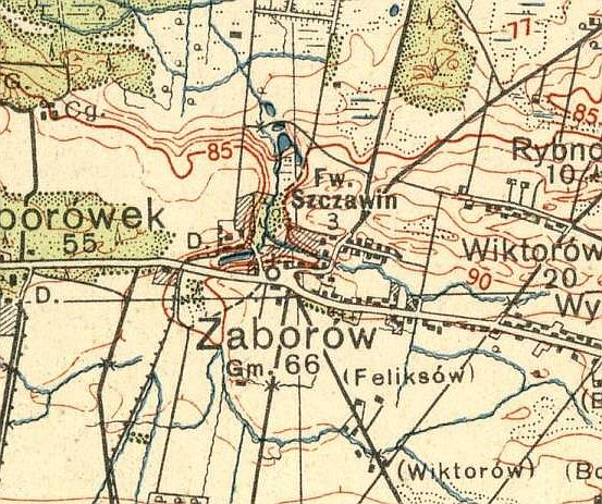 Zaborów (powiat warszawski zachodni), part of WIG map, P39 S31 MODLIN (1933-1934)